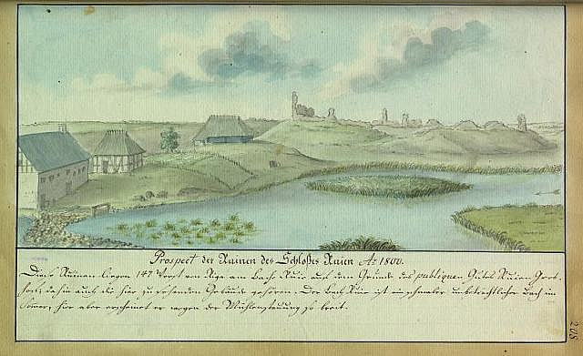 Scan from Johann Christoph Brotze's book Sammlung verschiedner Liefländischer Monumente. Prospect der Ruinen des Schloßes Ruien Anno 1800